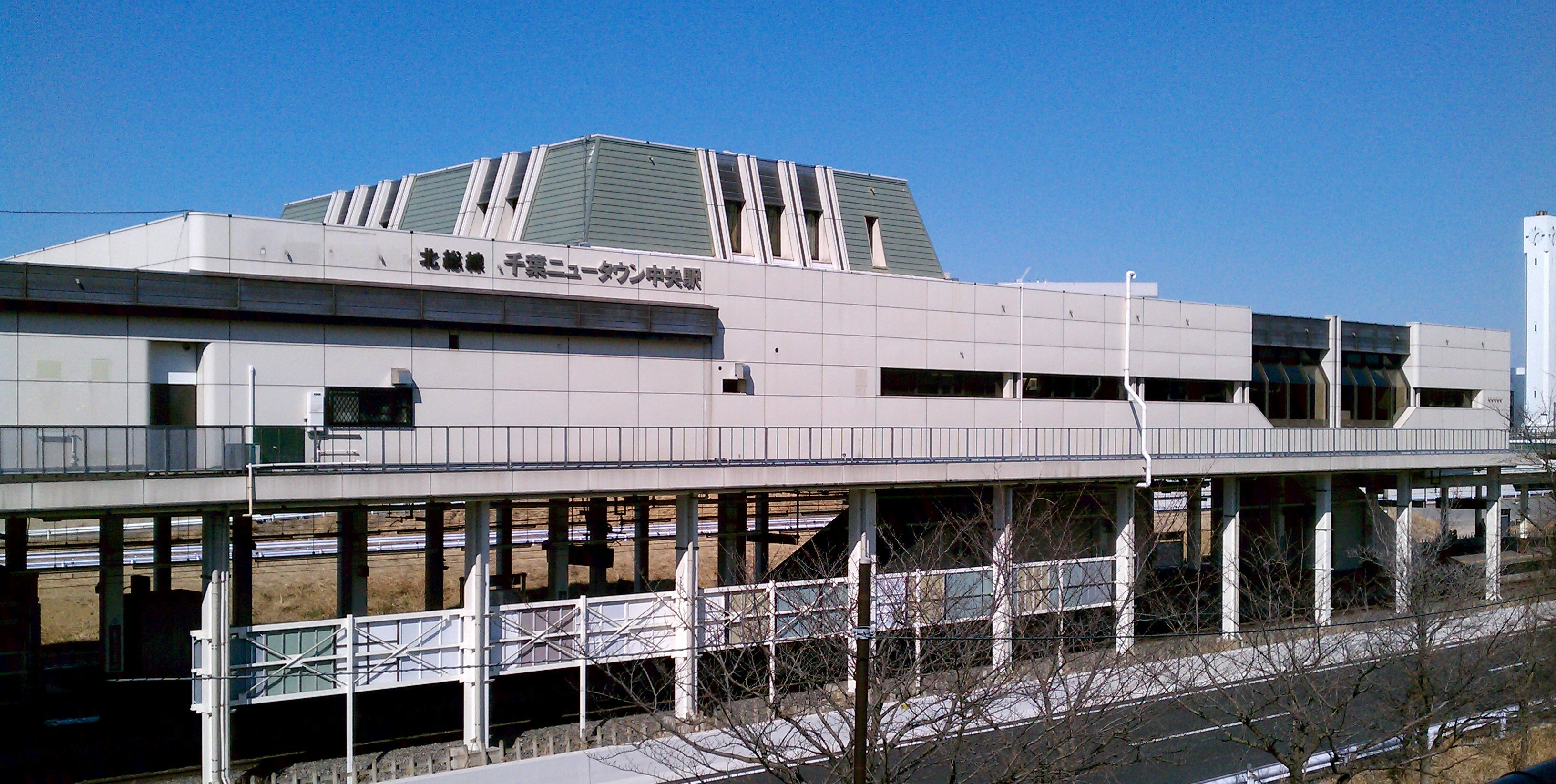 北総線・京成成田空港線 千葉ニュータウン中央駅 駅舎 （2013年2月撮影）